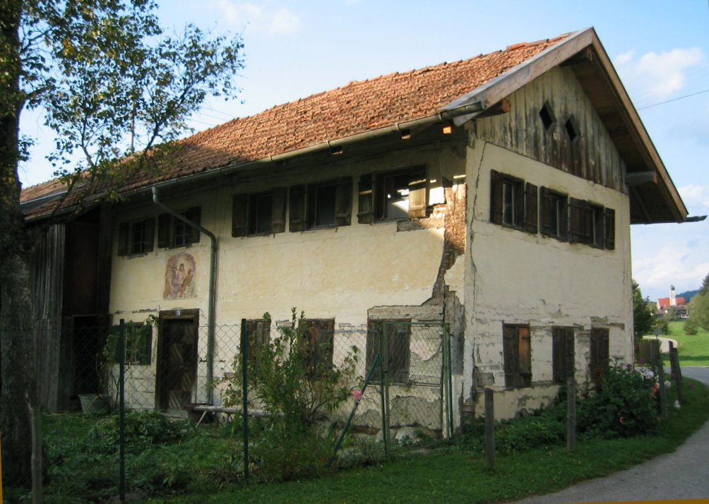 ehemaliges Kleinbauernhaus "beim Jakeler" in Unterdolden, Gemeinde Eisenberg (Allgäu), Wohnteil 2012 abgebrochen